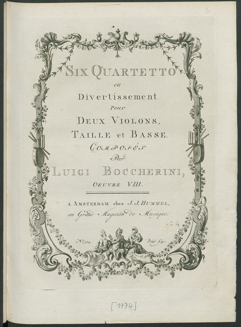 Six Quartetto ou Divertissement Pour Deux Violons, Taille et Basse. : Oeuvre VIII de Boccherini.